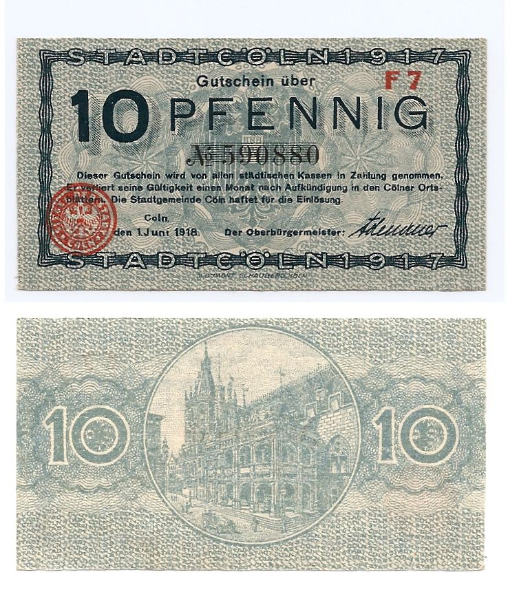 10 Pfennig 1 June 1918 Stadt Cöln, today Köln in the German state of Nordrhein-Westfalen. This note is signed by Konrad Adenauer as Mayor. After WW2 Adenauer became the 1st Chancellor of the Federal Republic of Germany. On the reverse of this bank note you see the historical town hall (Rathaus). Condition: UNCIRCULATED, no hidden problems.